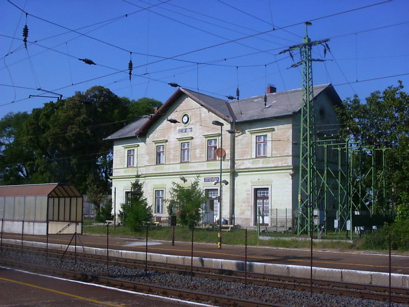 Öttevény vasútállomása